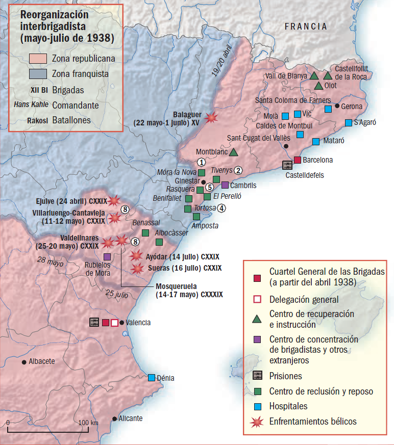 Fragmento de la página 58 del libro "Las Brigadas Internacionales", de Víctor Hurtado y José Luis Martín Ramos (DAU, 2013). El mapa explica el proceso de reorganización de las Brigadas Internacionales entre junio y agosto de 1938, justo antes de la batalla del Ebro.